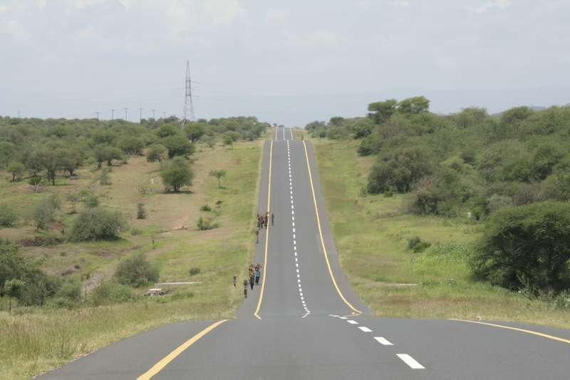 Tanzania Safari